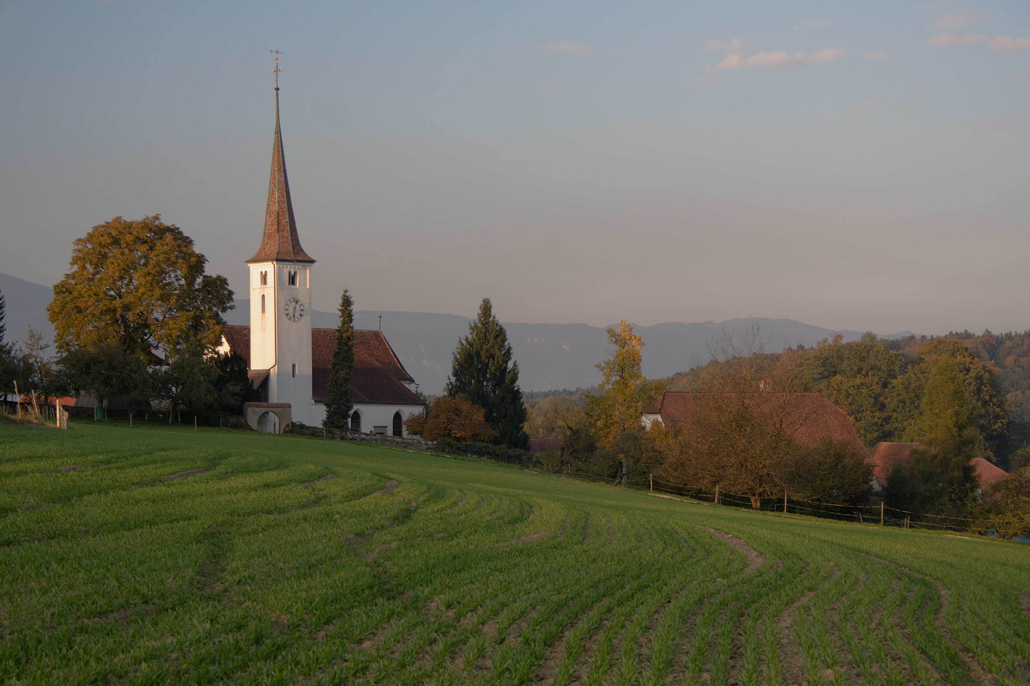 Die Kirche von Oberwil bei Büren, SchweizIm Hintergrund der JuraAufnahme mit Polfilter